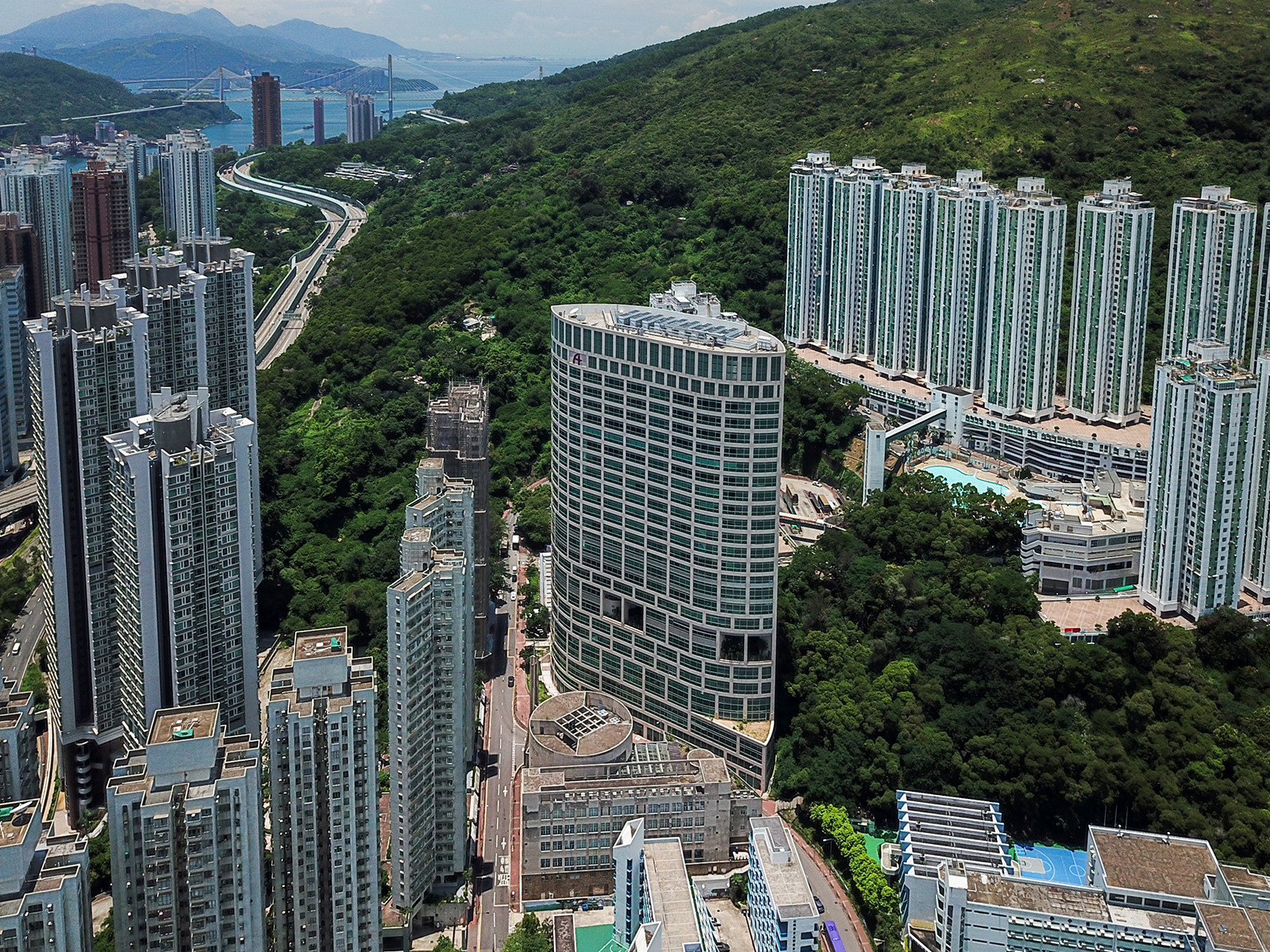 Hong Kong Adventist Hospital - Tsuen Wan